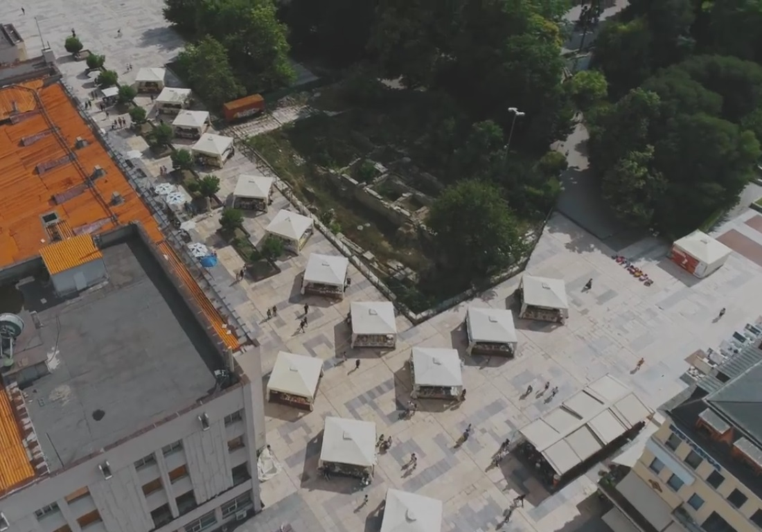 Алея на книгата в рамките на литературен фестивал Пловдив чете 2018